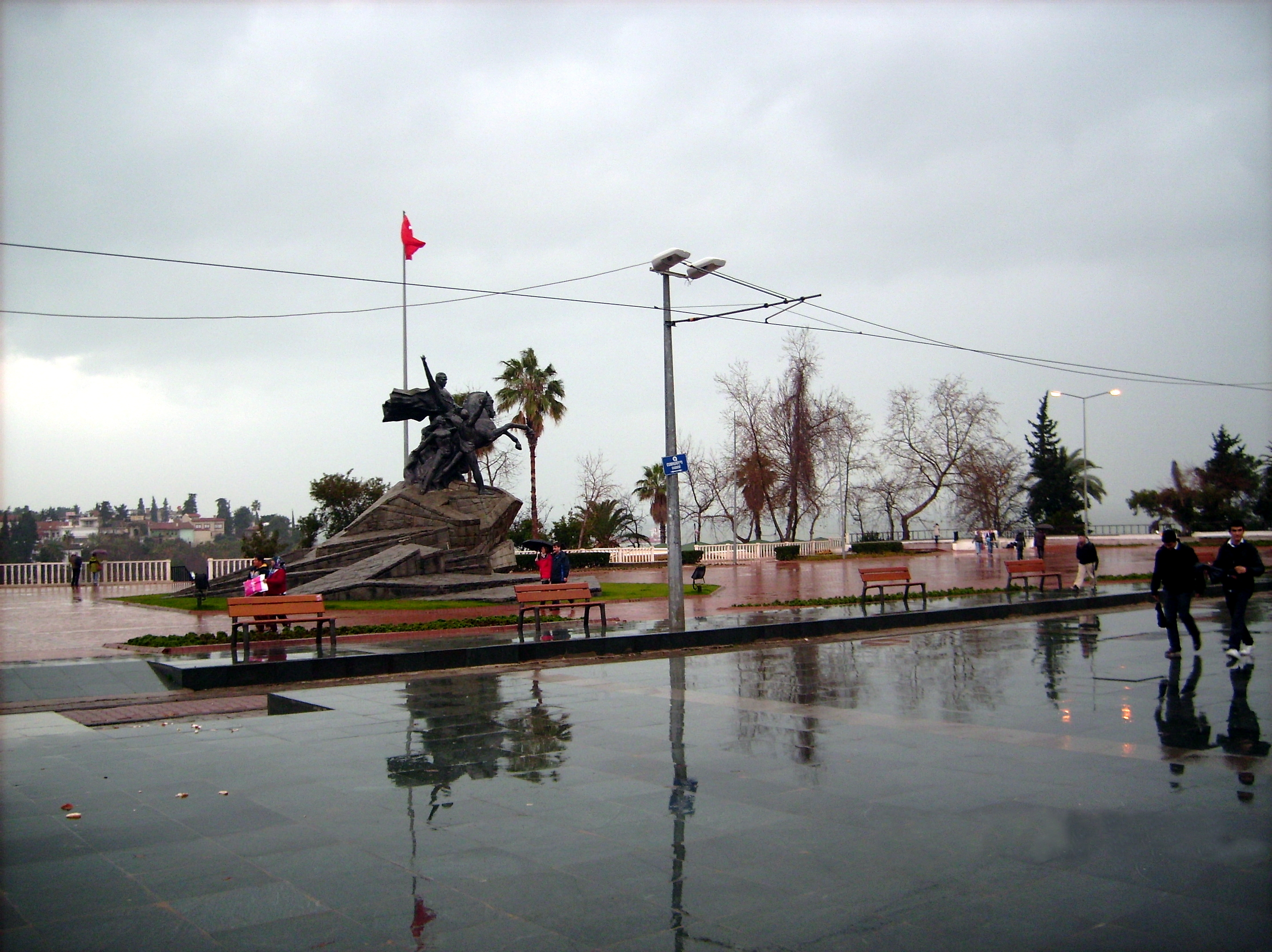 Atatürk-Denkmal in Antalya